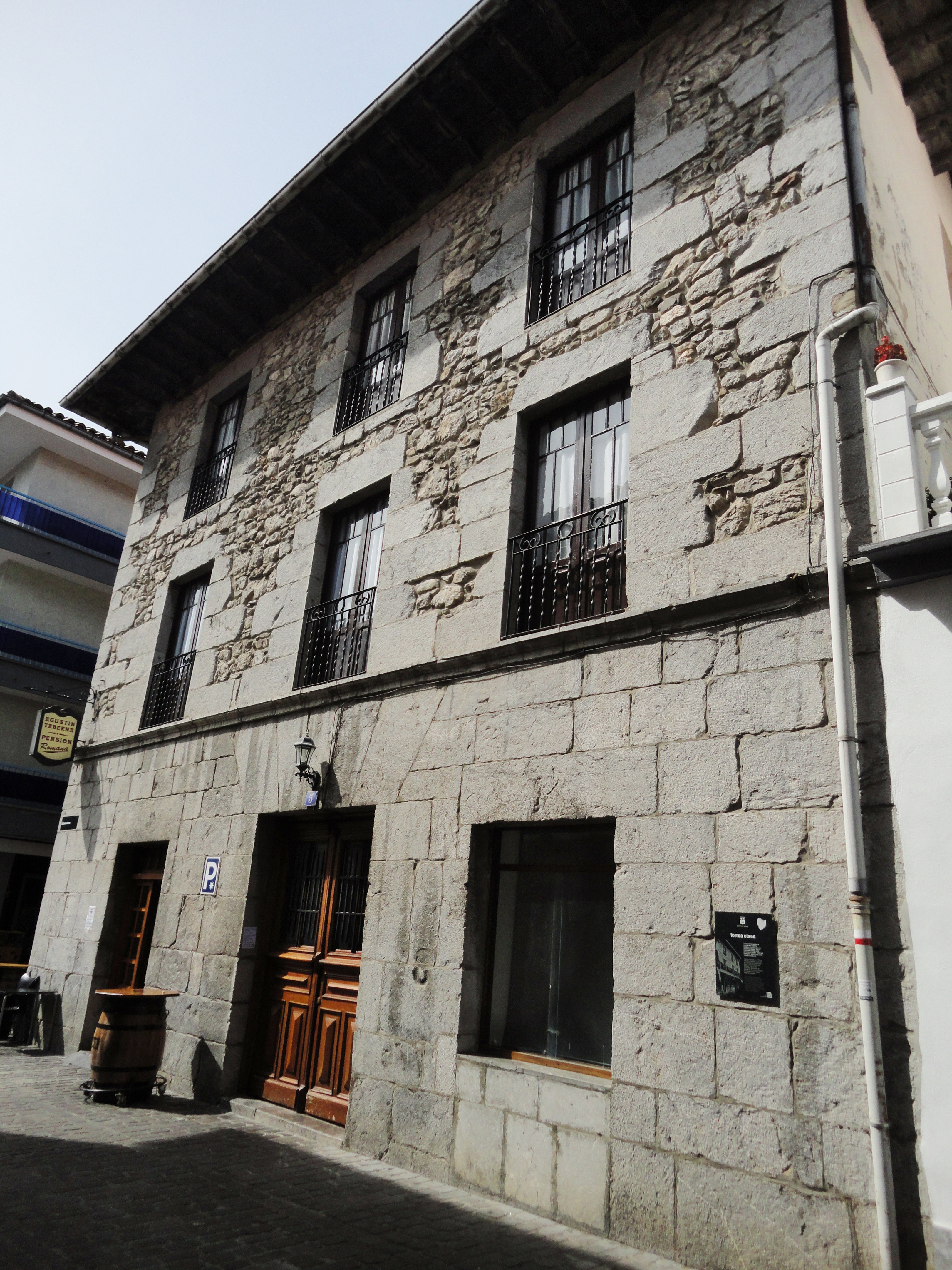 Torrea etxea - Zestoa